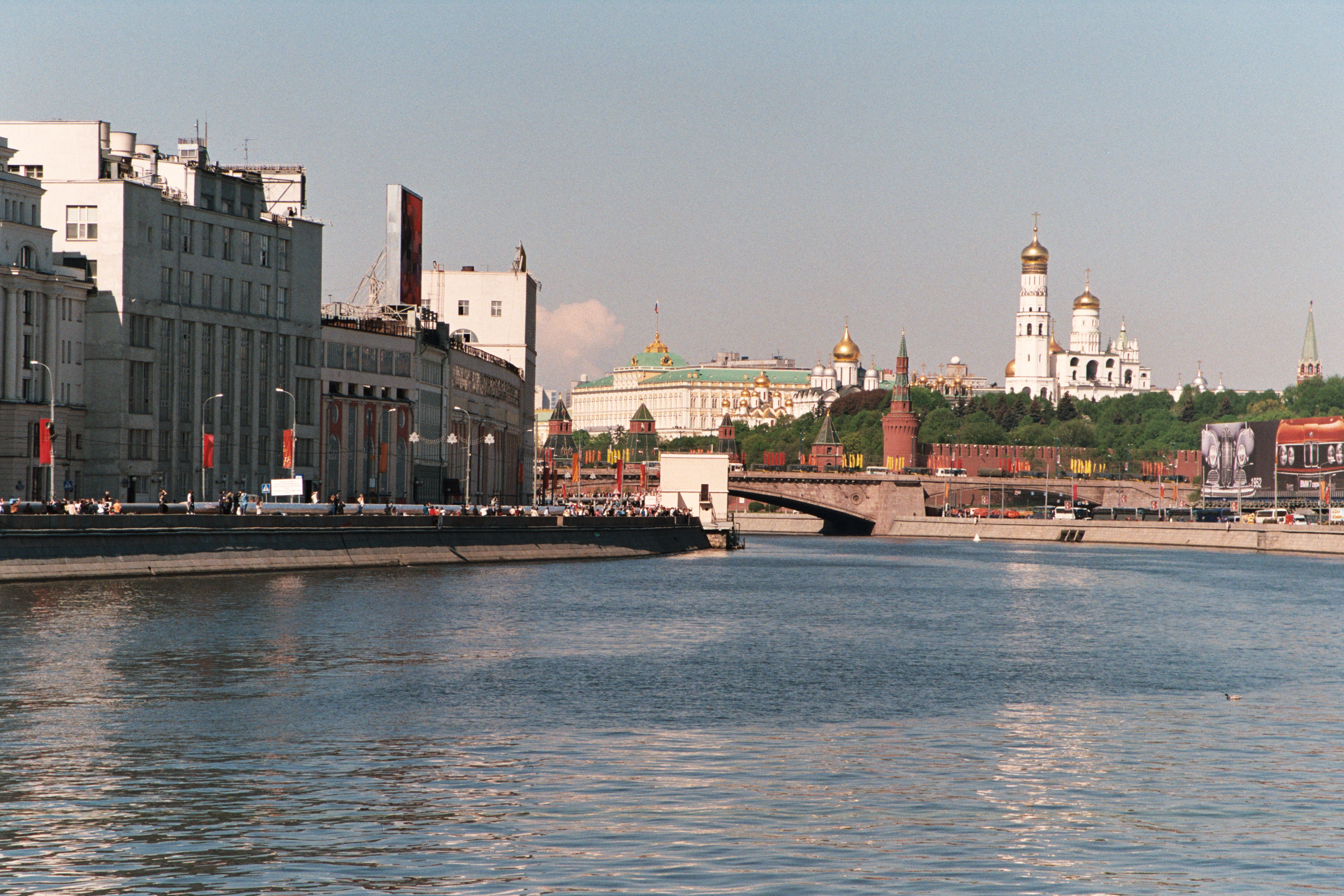 Москва-река